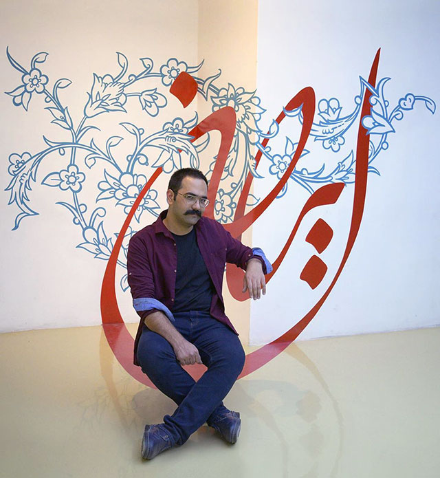 تابلو واریخت شده یک هنر جالب است که تنها از یک زاویه دیده می‌شود. این هنر با استفاده از خطای دید به وجود می‌آید